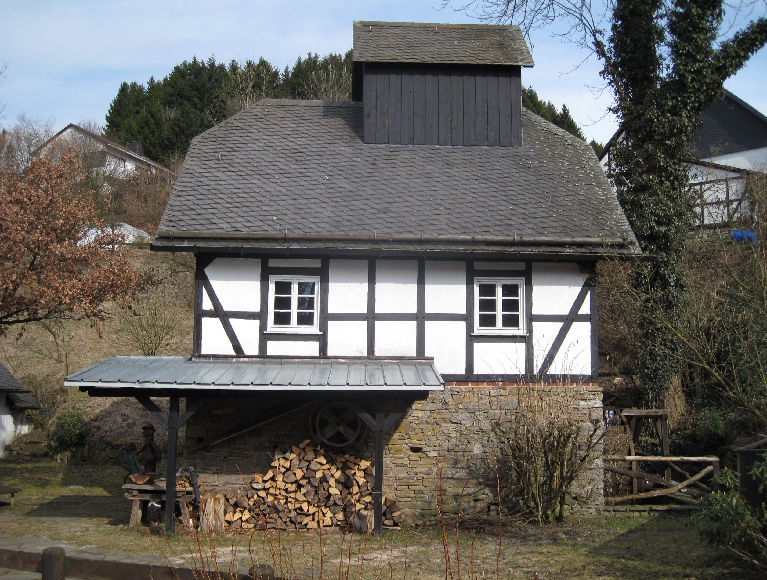 Alte Mühle (Cobbenrode), Am Mühlknapp in Eslohe-Cobbenrode.